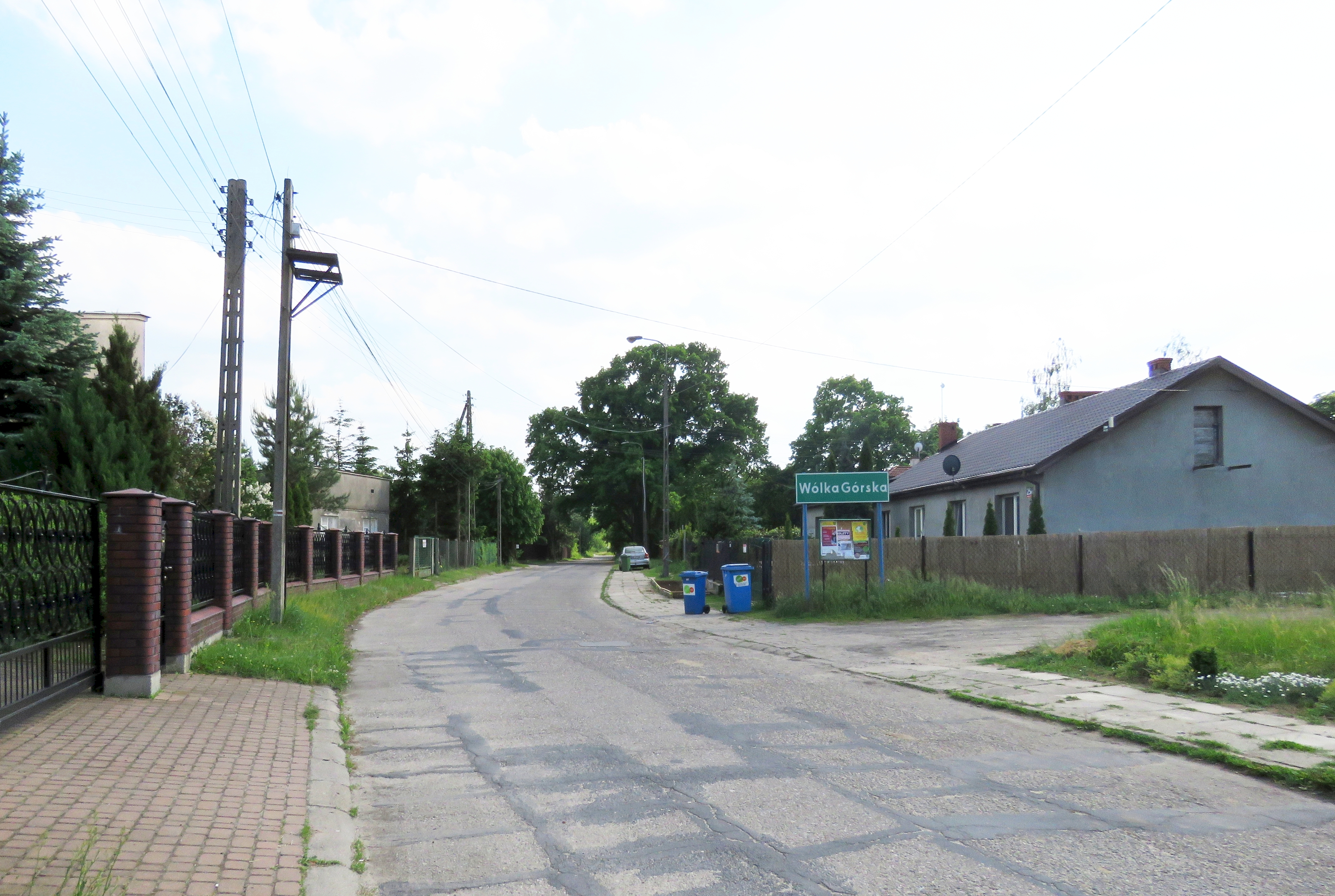 Wólka Górska